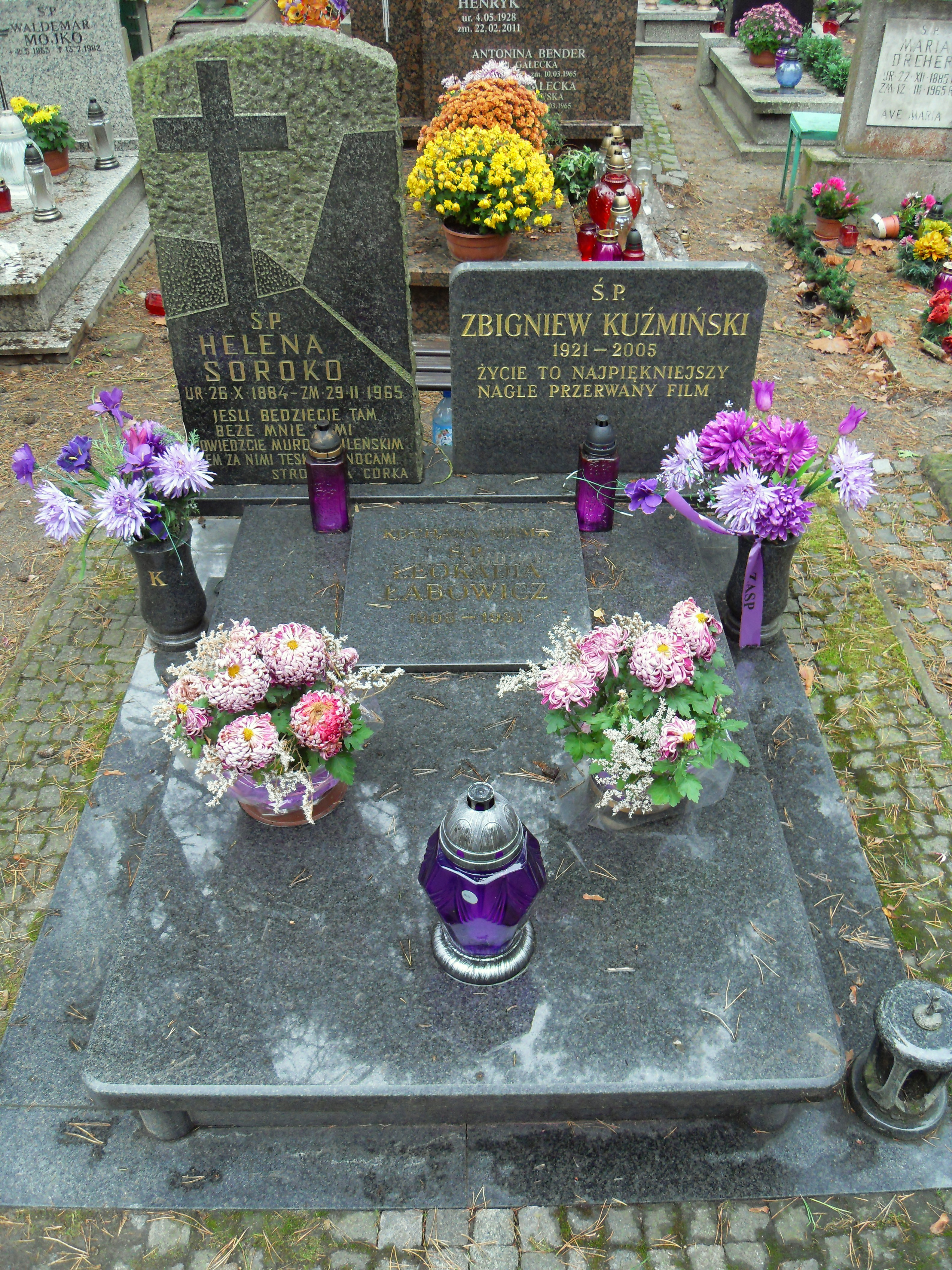 Gdańsk Wrzeszcz. Cmentarz Srebrzysko, grób Zbigniew Kuźmiński.